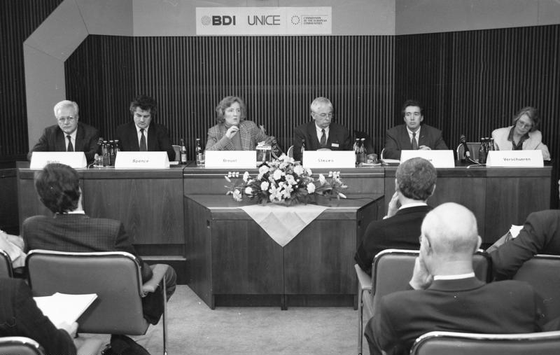 Berlin, 27.5.1991 Gemeinsam mit dem Europäischen Verband der Industriellen und Arbeitgeber (UNICÉ) und der EG-Kommission veranstaltete der BDI im Kongreßzentrum Märkisches Ufer eine Internationale Konferenz mit dem Thema "Eastern Germany - Open for International Investments". Die Eröffnungsansprache hielt die Präsidentin der Treuhand, Birgit Breuel.